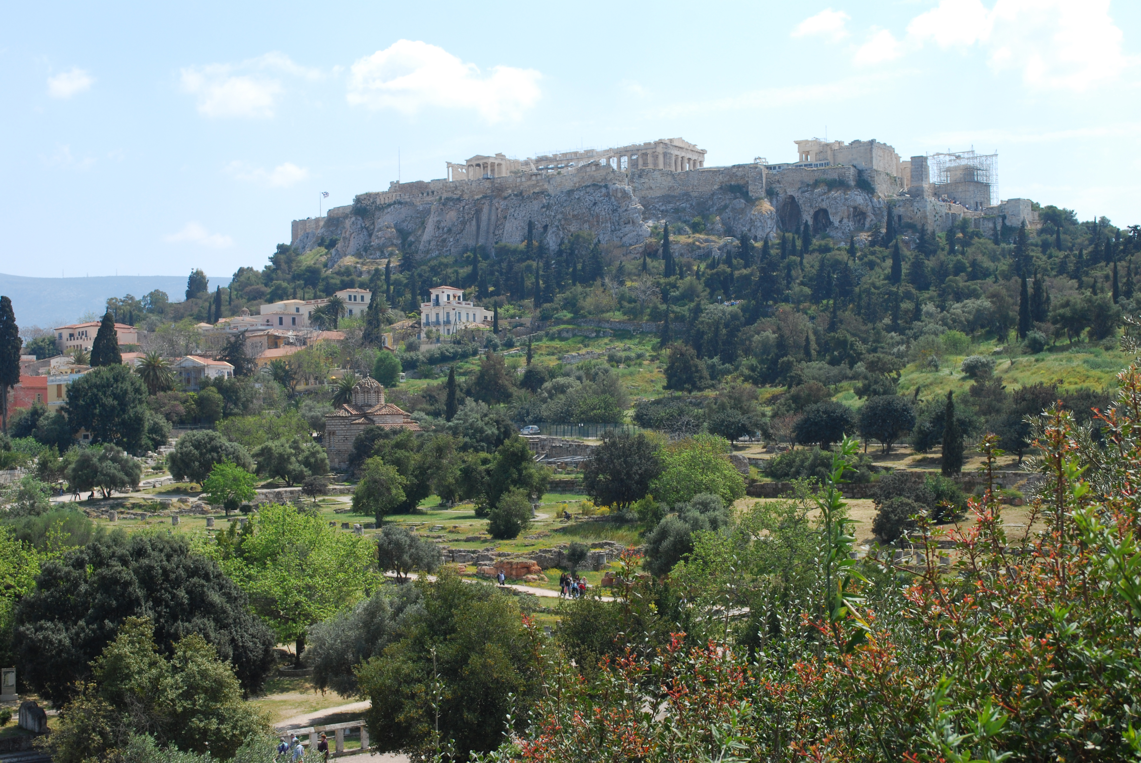 Vue d'ensemble de l'agora d'Athènes.